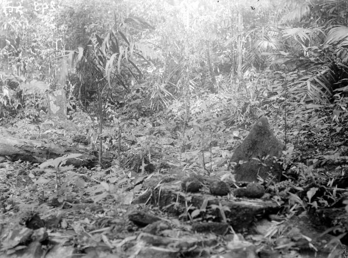 Négatif. Undakan pada situs mégalitik di Kosala, Banten.